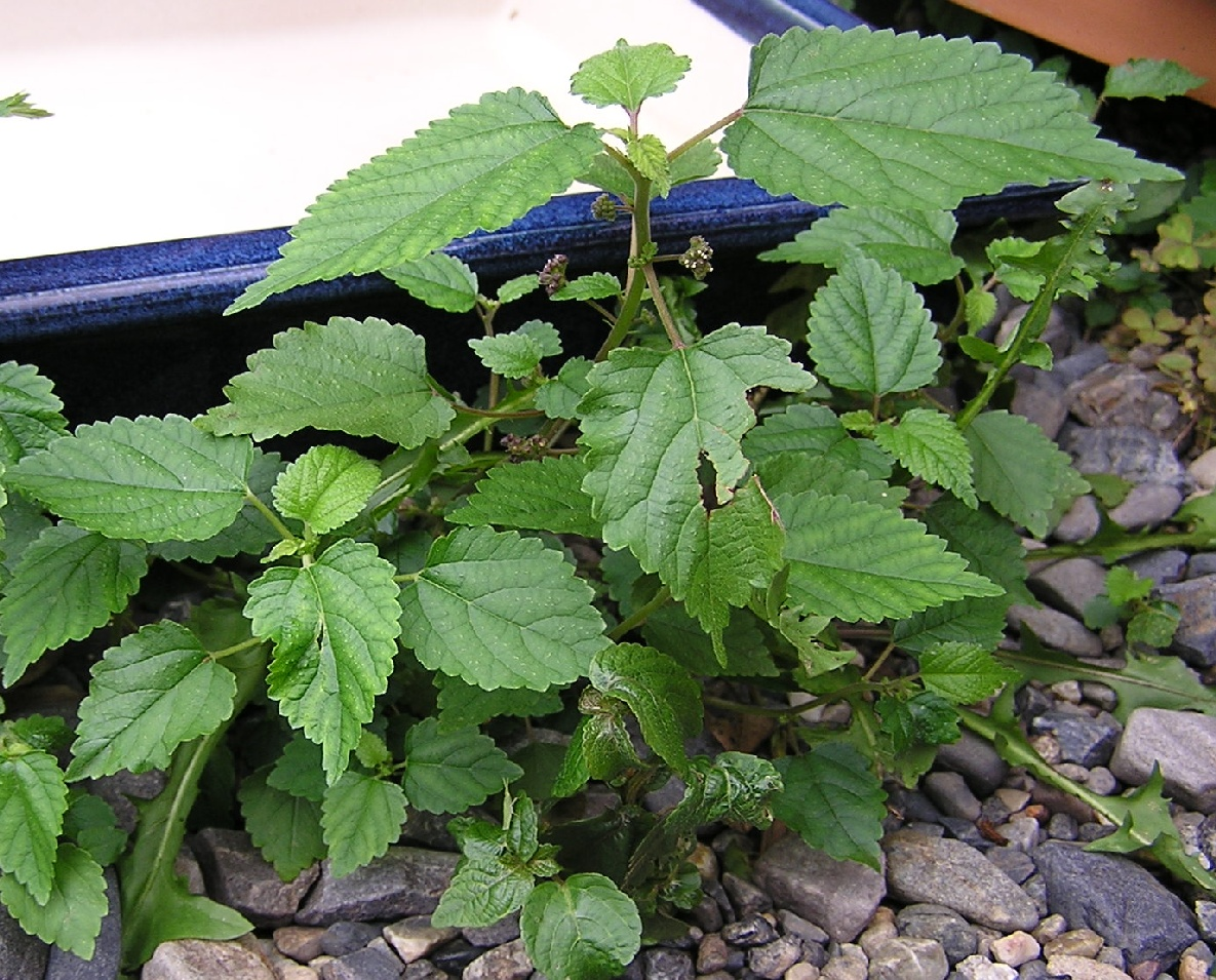 Fatoua villosa an einem Straßenrand in Shigaraki (Präfektur Shiga, Japan).